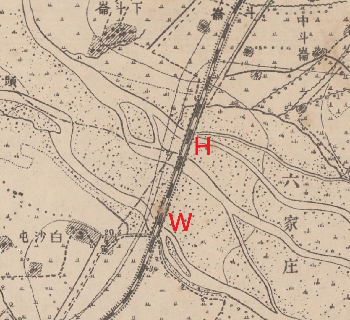 在《臺灣地形圖》上面台鐵頭前溪橋的前身：紅毛田溪橋(H位置)與烏樹林溪橋(W位置)的截圖。